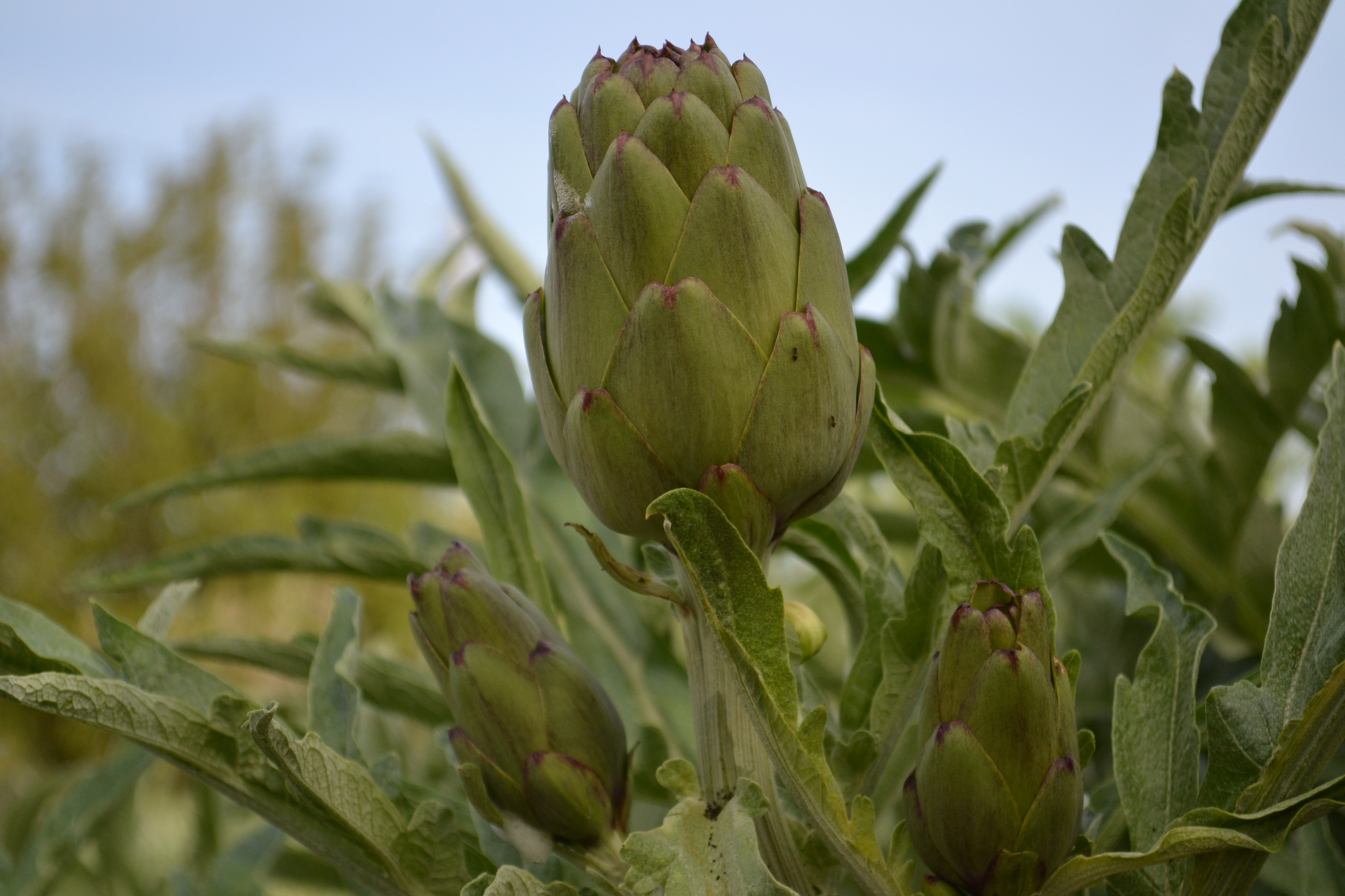 Carciofo Verde di Putignano, inserito nei PAT pugliesi.